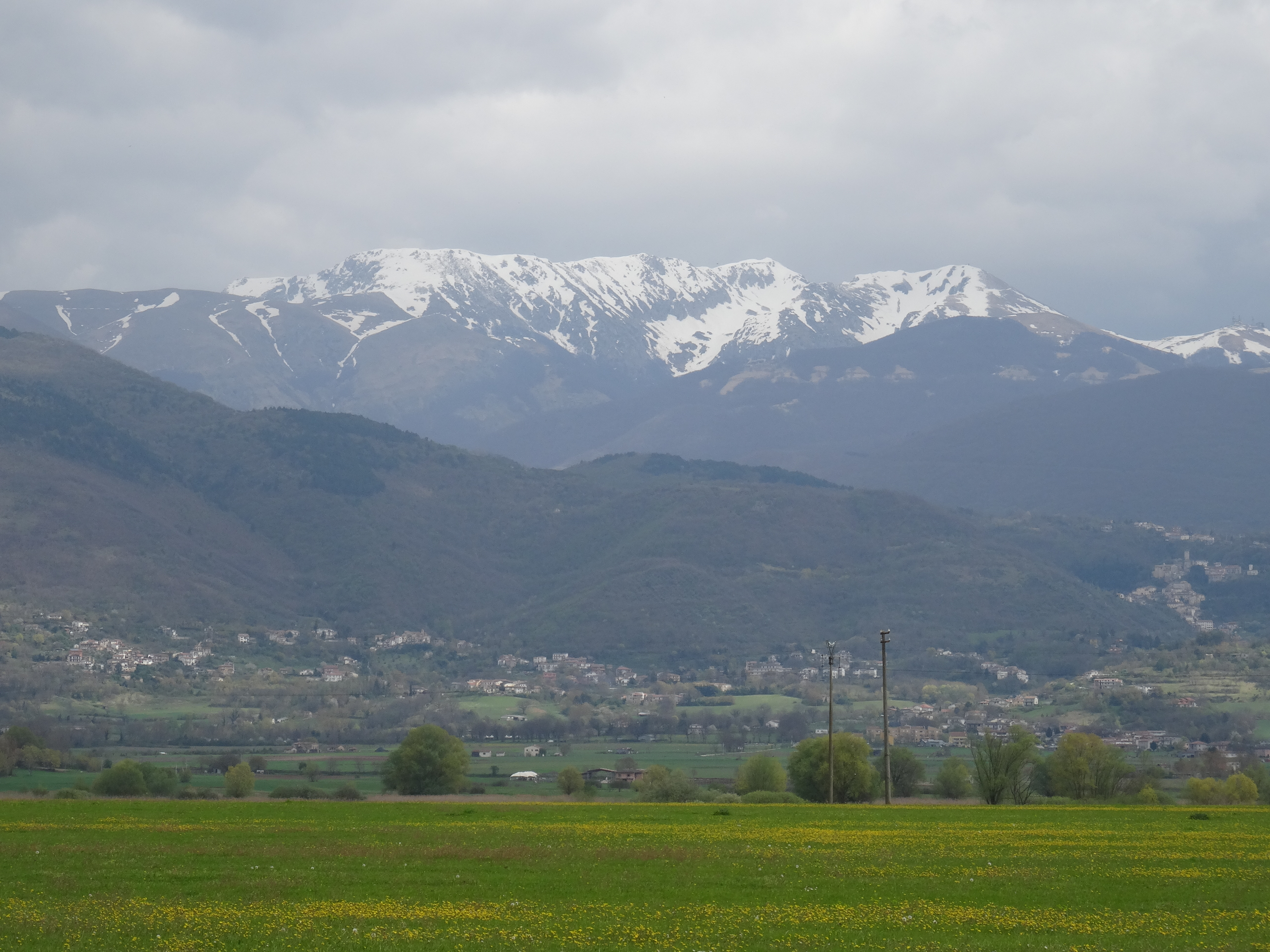 Monte Terminillo